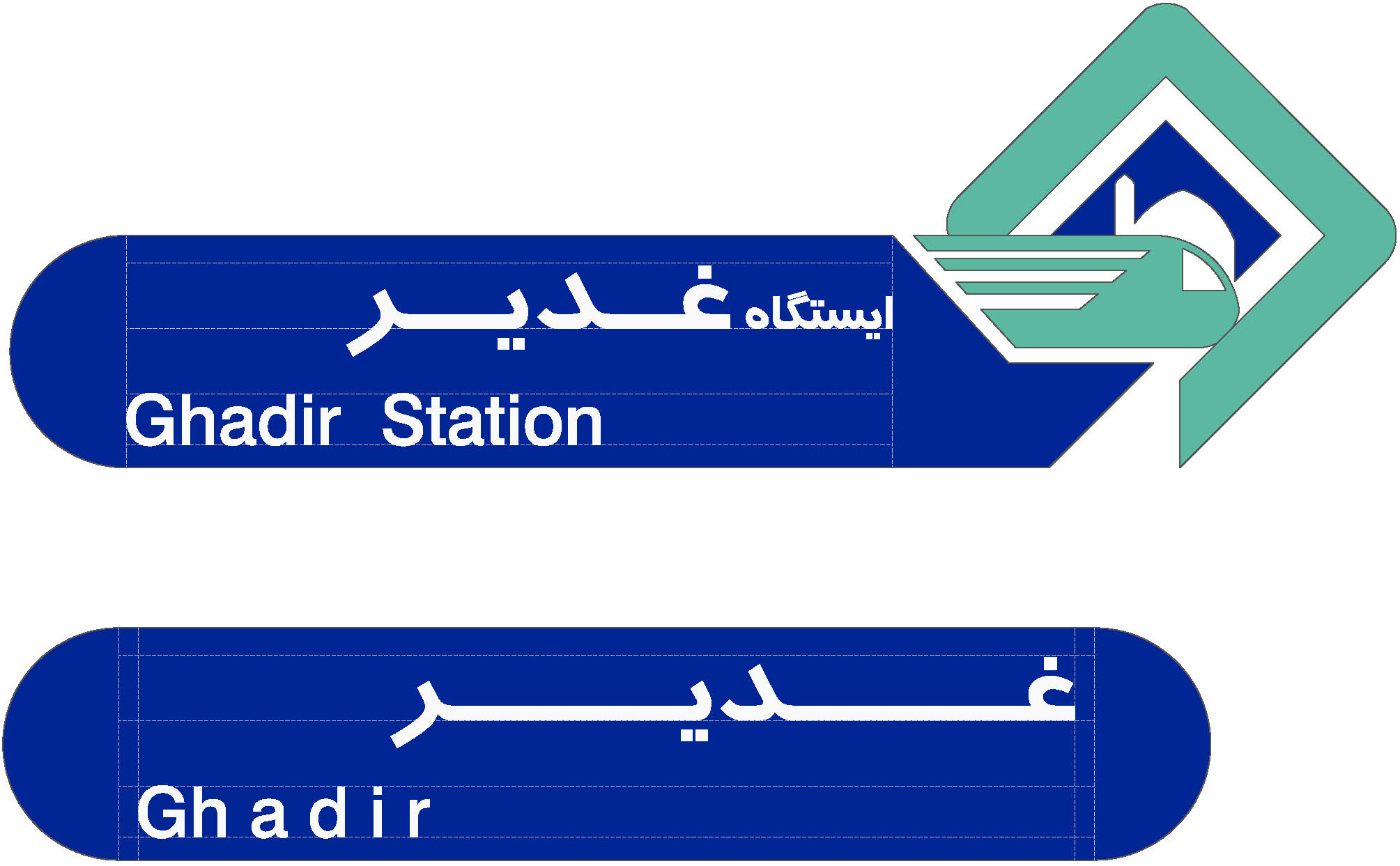 علامت ایستگاه مترو غدیر مشهد